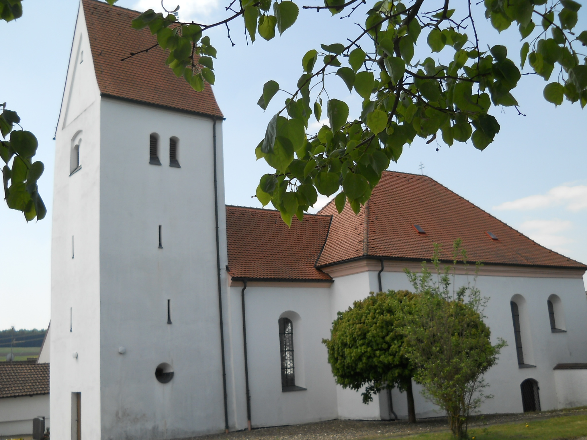 Nordansicht